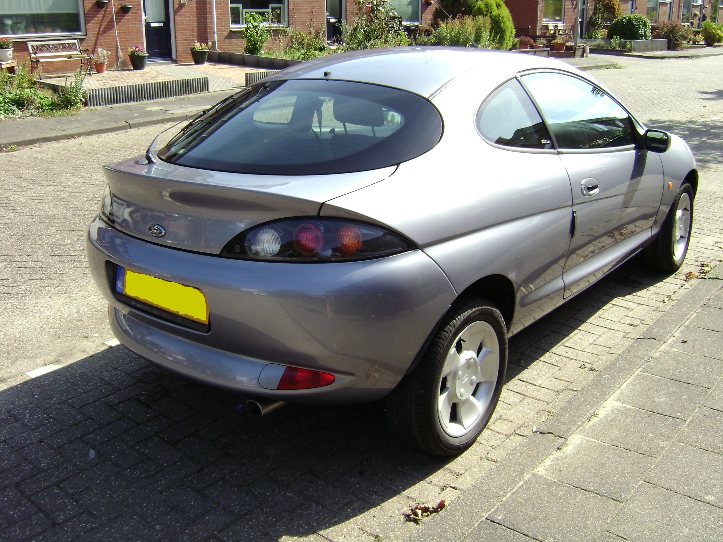 ford puma achterkant